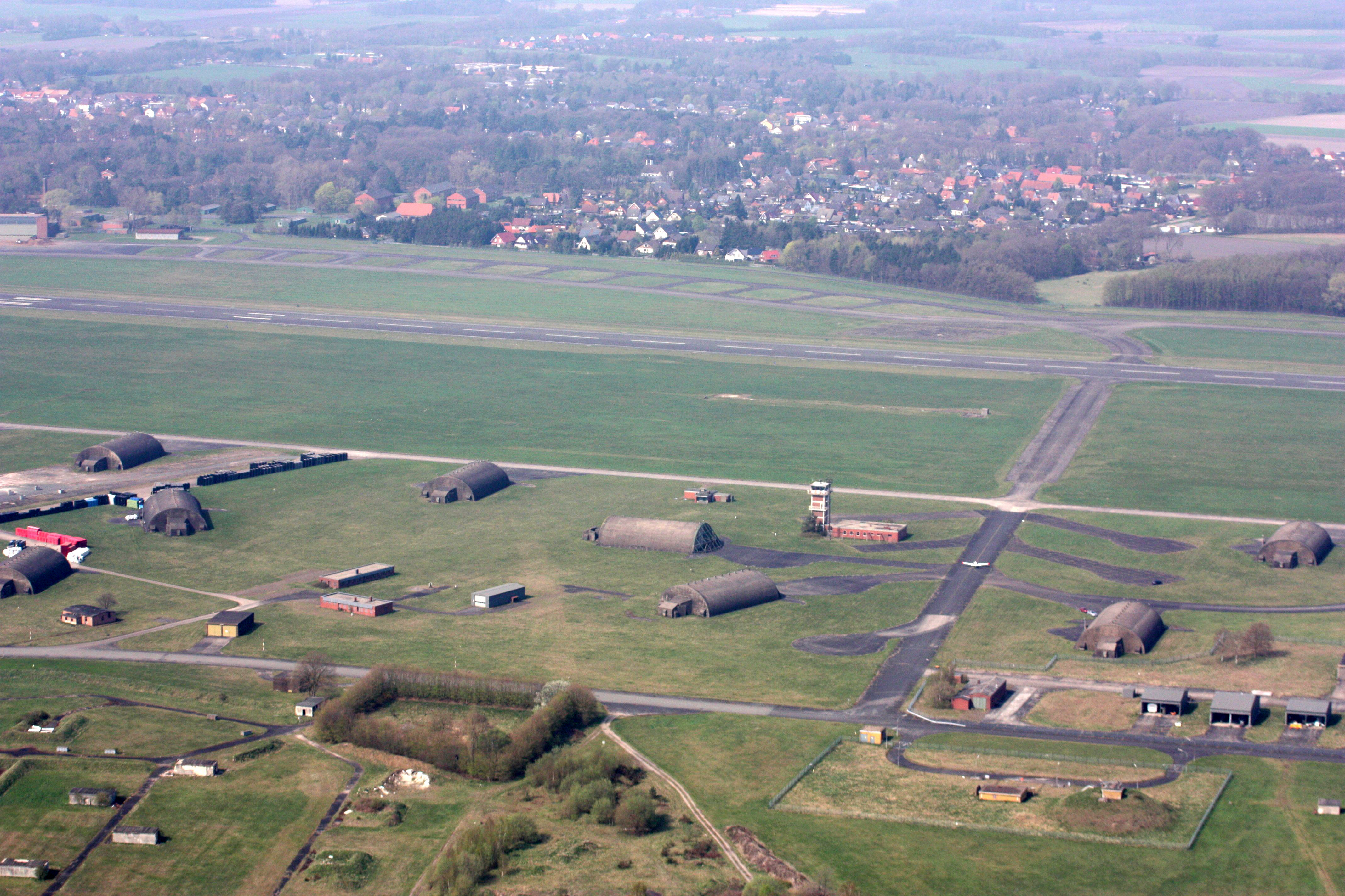 Dreieck Ahlhorner Heide und nähere Umgebung; östlich der A 29 vom Dreieck Richtung Oldenburg